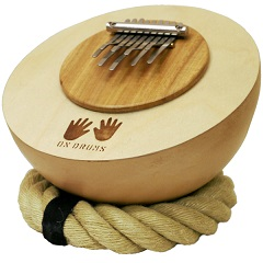 Lamellophon Sperrholzbrett auf Keramik